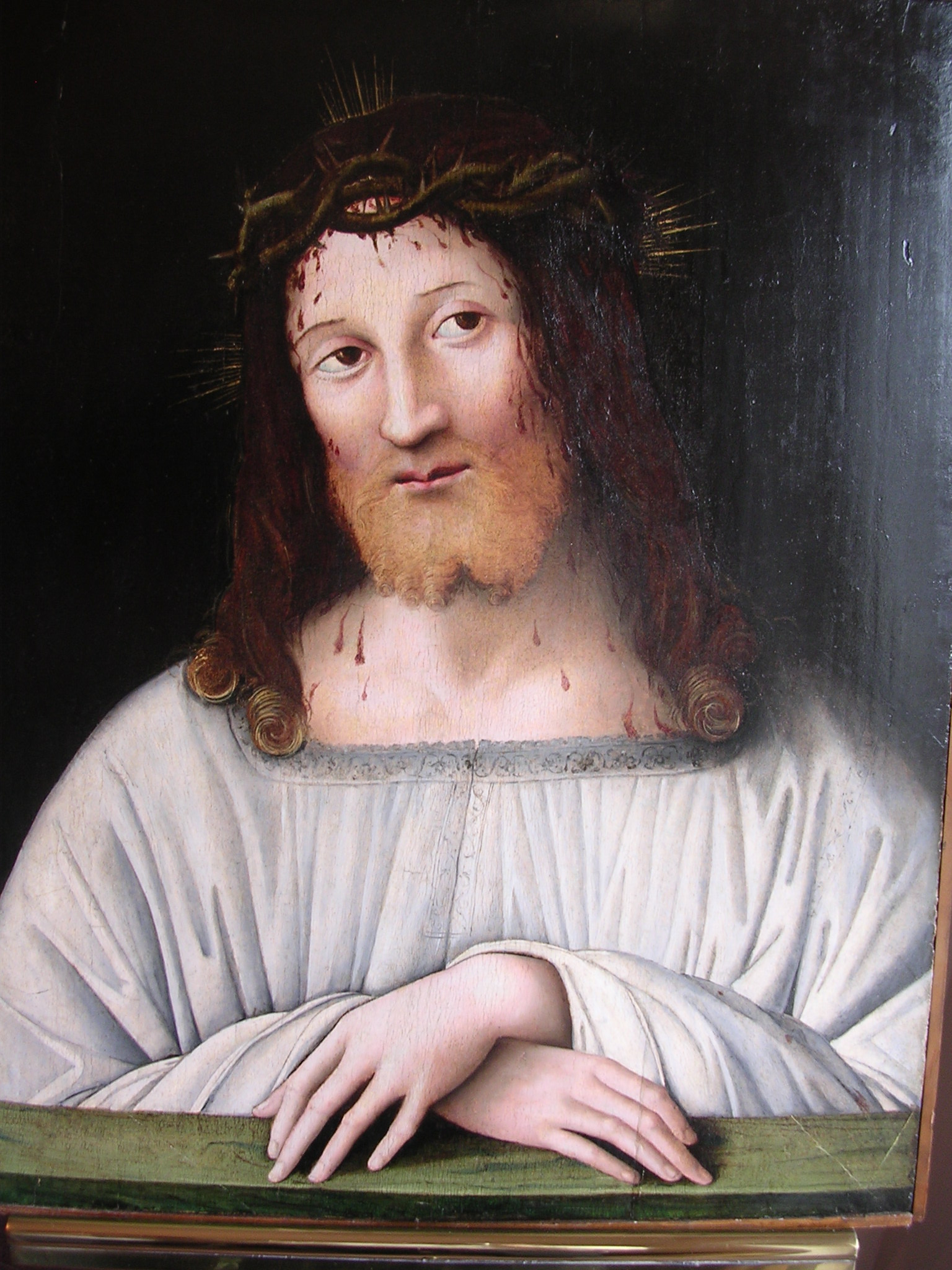 Andrea Solari, olio su tavola 61x50